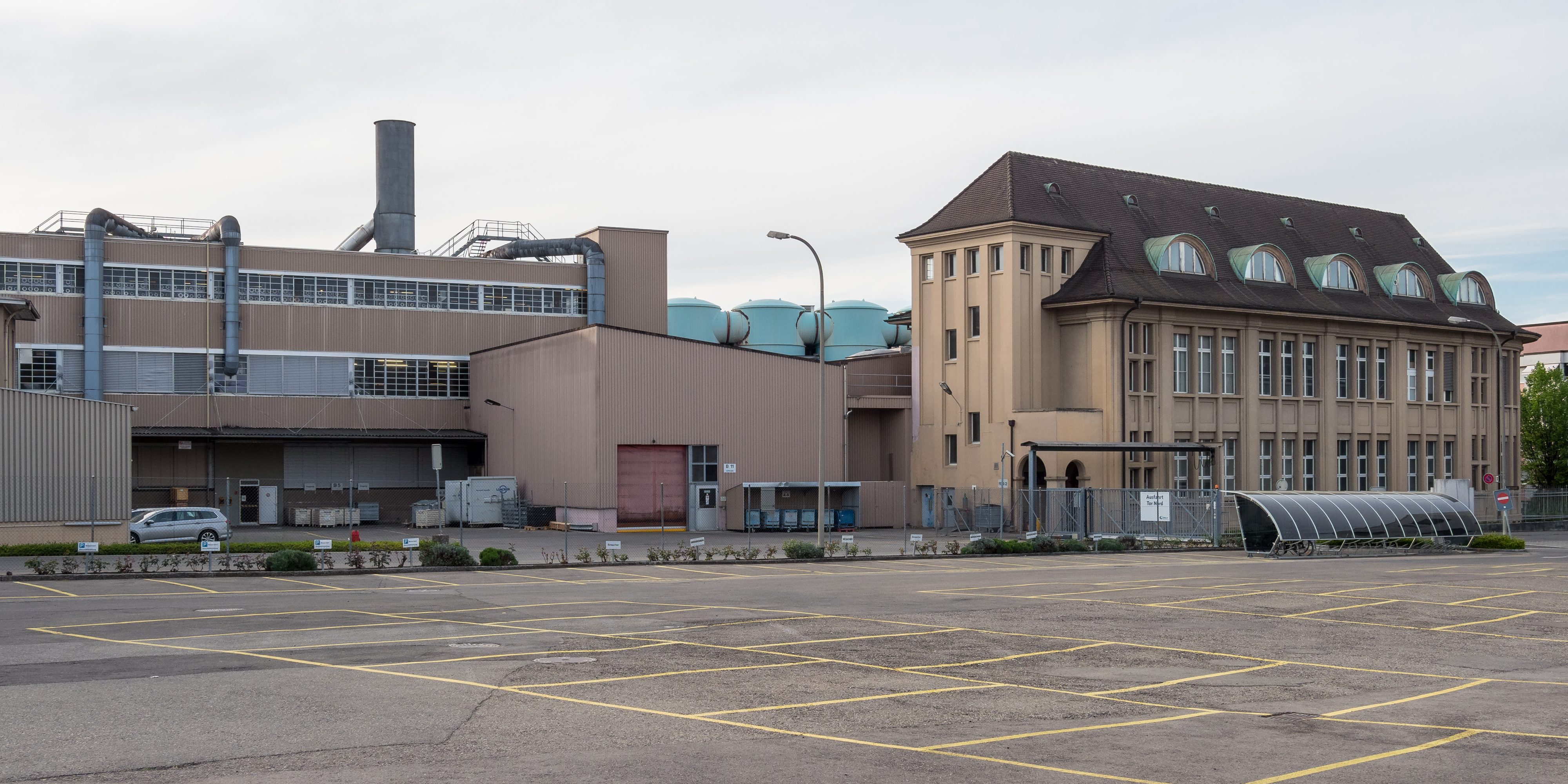 Kreuzlingen: Gebäude der Amcor Flexibles Kreuzlingen AG, rechts der Stammbau des ehemaligen Fabrikgeländes Neher, erbaut 1925 als Walzwerk für Aluminiumfolien.